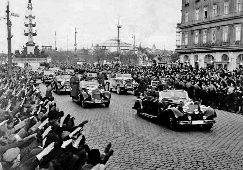 This description has been identified as biased or incorrect: Nazi-Propaganda ("geschichtliche Grosstat")Wiens Gruss an den Führer nach der geschichtlichen Grosstat. Als erste Stadt des Grossdeutschen Reiches war es der Hauptstadt der Ostmark, Wien, beschieden, den Führer in ihren Mauern nach seiner geschichtlichen Grosstat zu sehen und ihn in einem unbeschreiblichen Begrüssungsjubel des Dankes der Ostmark zu versichern. Unser Bild zeigt die Wagenkolonne des Führers bei der Einfahrt in die Wiener Innenstadt. Im Hintergrund links das Tegetthoff-Denkmal Information added by Wikimedia users.